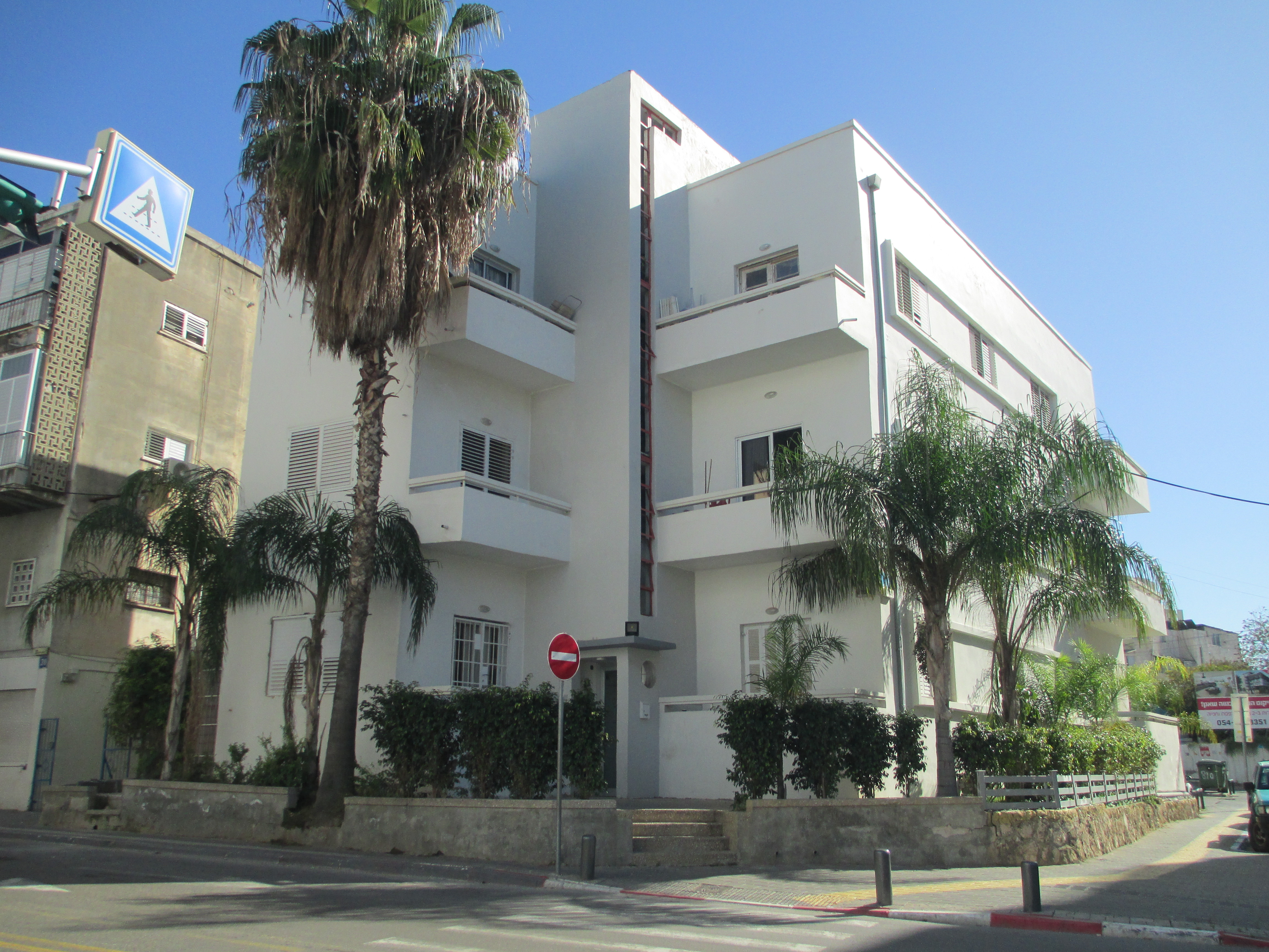 בית ילדותו של חנוך לוין ברחוב ראש פינה 18 בתל אביב